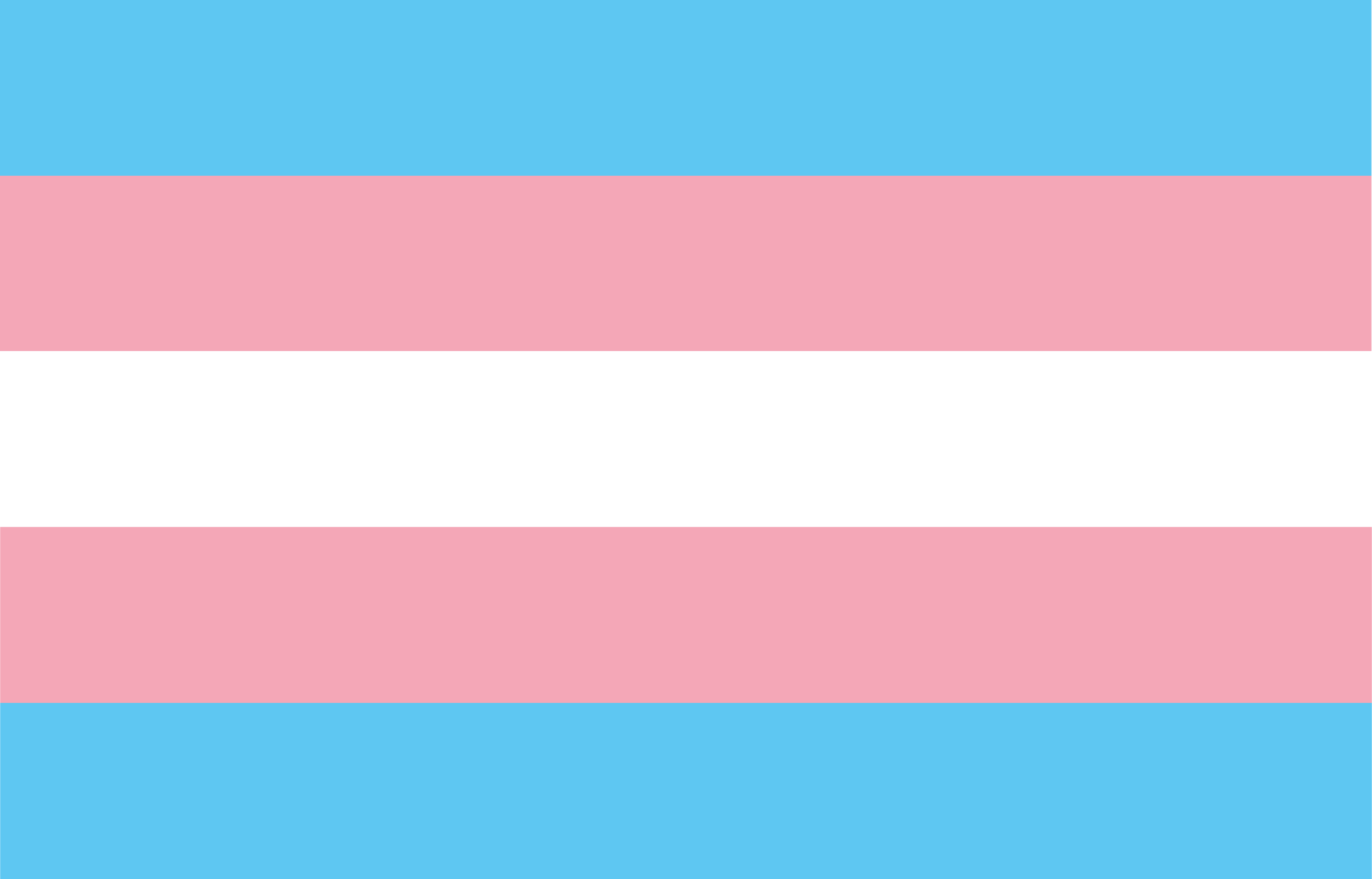 Trans harrotasuna irudikatzen duen bandera.